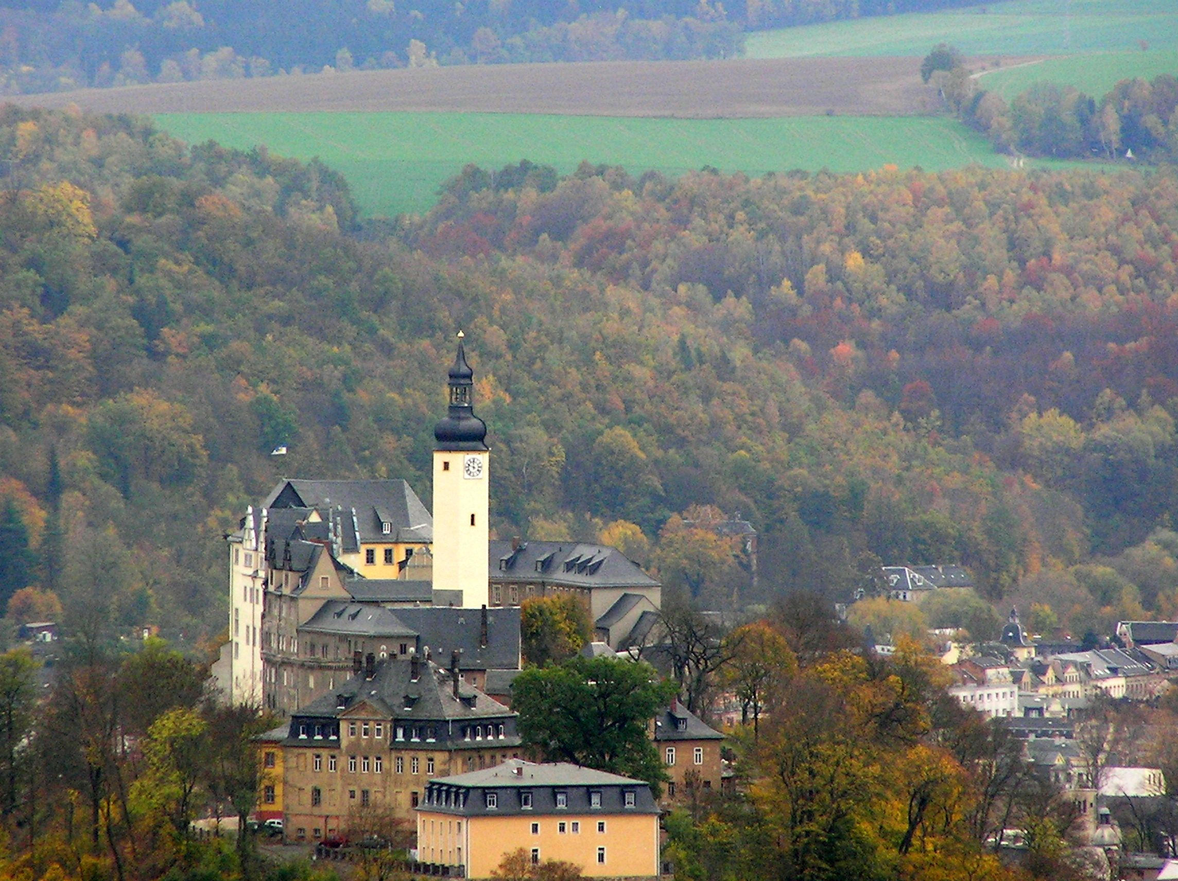 Blick zum "Oberen Schloß" vom "Weißen Kreuz" in Greiz, Deutschland